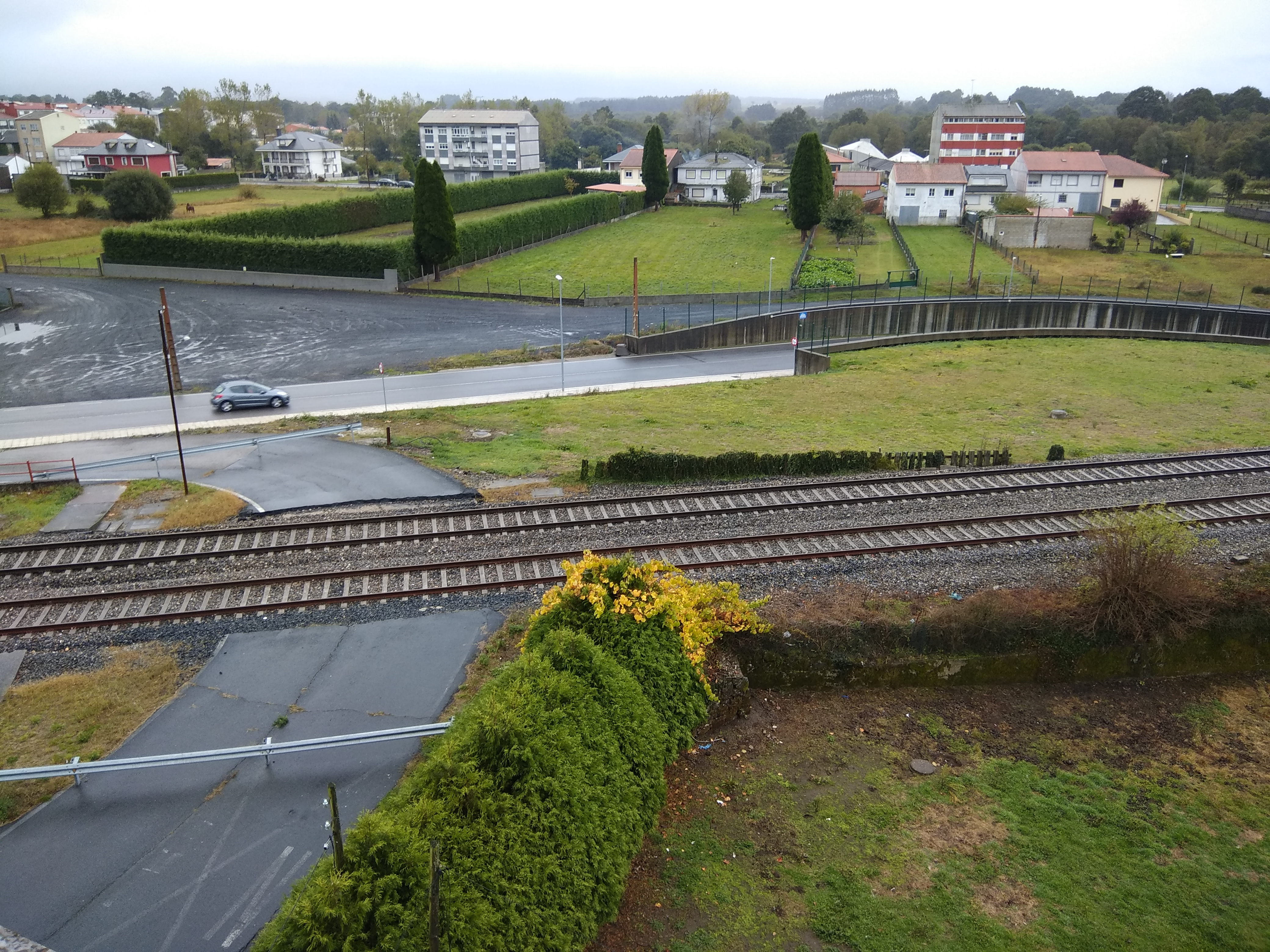 Antigo paso a nivel en Teixeiro, Curtis, Galiza.